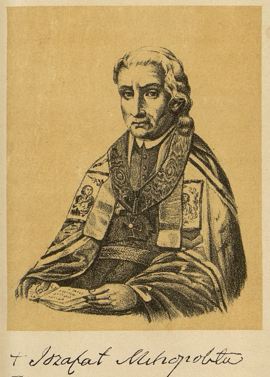 Беларуская (тарашкевіца): Партрэт Язафата Булгака (Jazafat Bułhak)